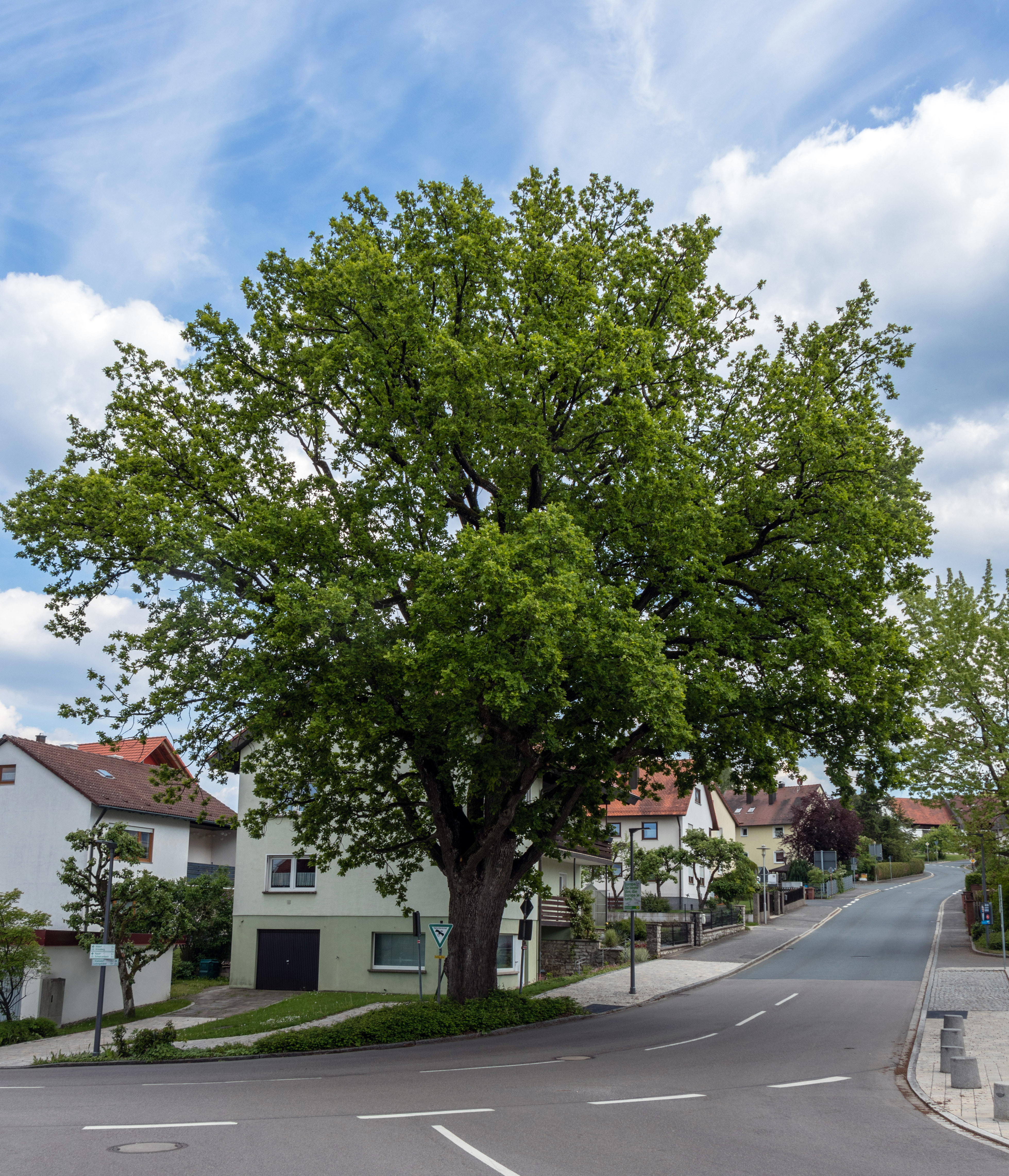 Burgthanner Alteiche, Burgthann, Naturdenkmal